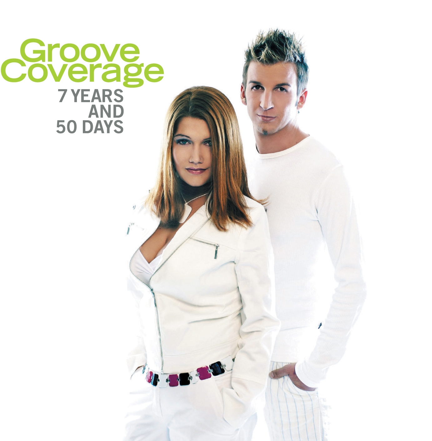 Cover des Groove Coverage-Albums "7 Years And 50 Days"